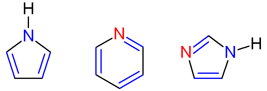 Aromaticiteit bij heterocyclische stikstofverbindingen: pyrrool, pyridine en imidazool. Rood: niet-aromatische stikstofatomen; blauw: aromatisch systeem